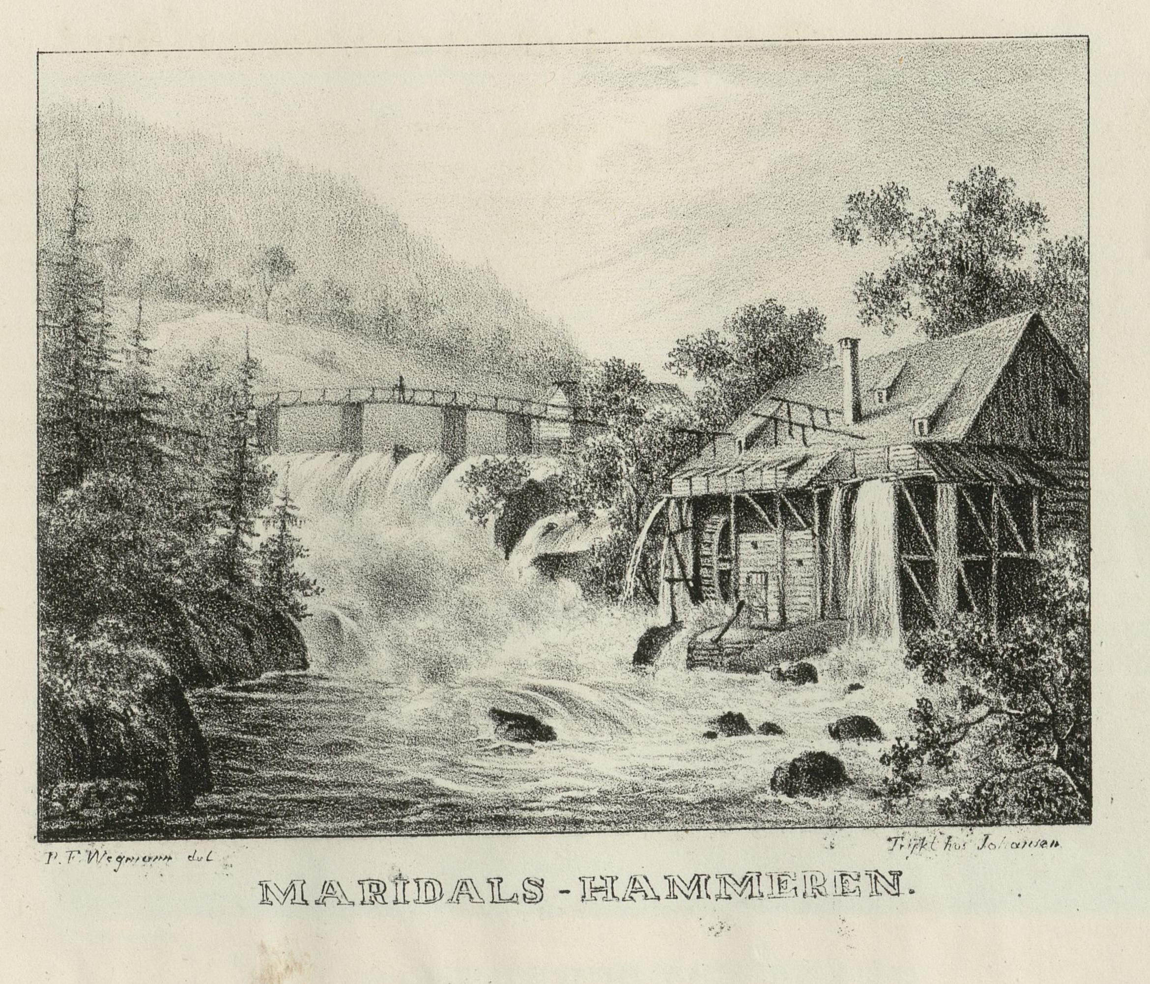 Illustrasjon hentet fra boken "Norge, fremstillet i lithographerede Billeder efter Naturen" av Wergmann, P.F. og utgitt av P.F. Wergmann (Christiania, 1836-1837)